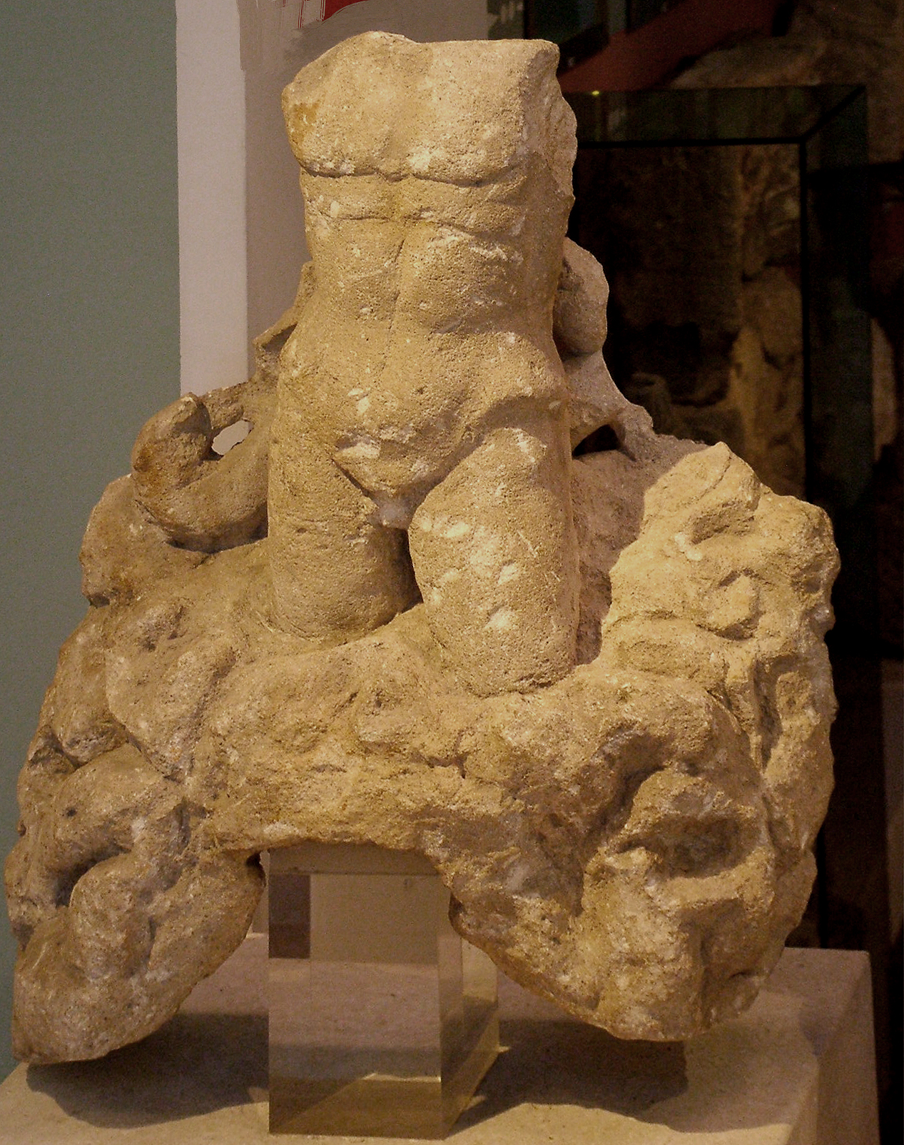 A sziklából születő Mithrasz torzója (Carnuntinum Múzeum, Bad Deutsch Altenburg, Ausztria)